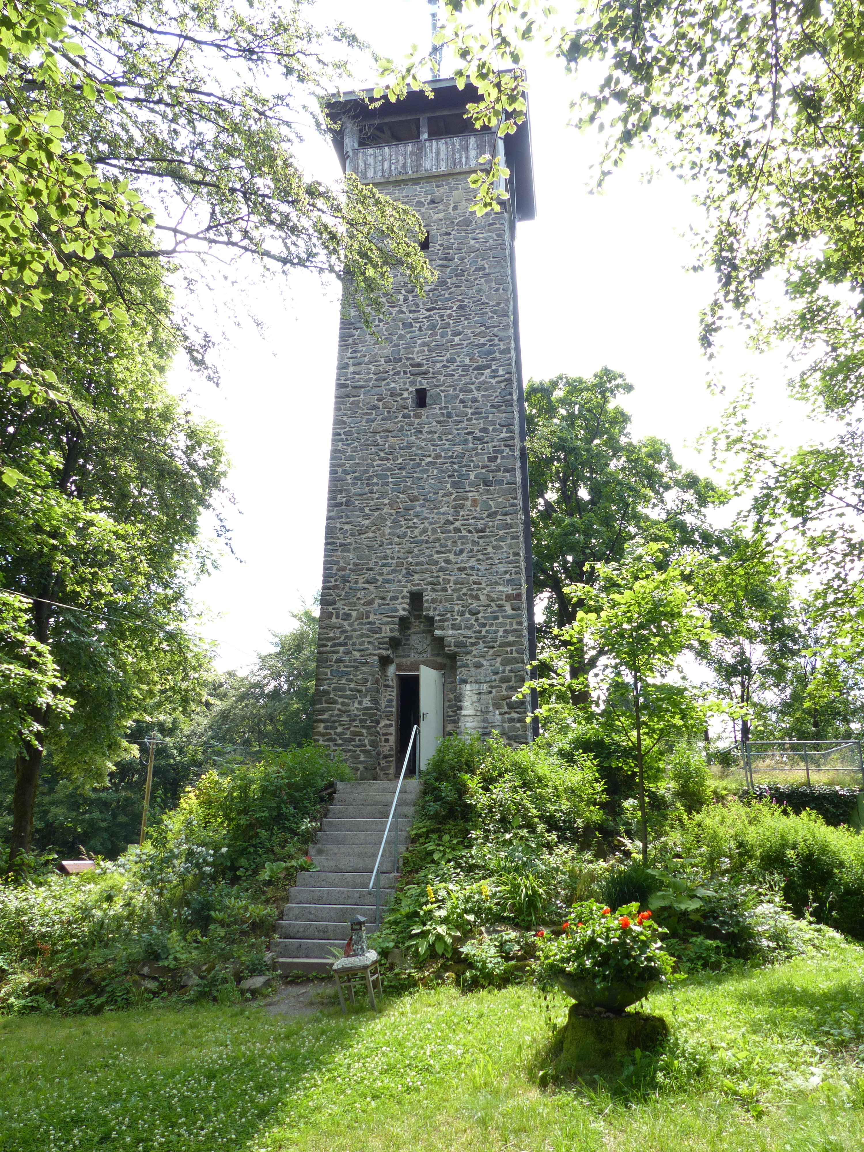 Ansicht vom Weißensteinturm